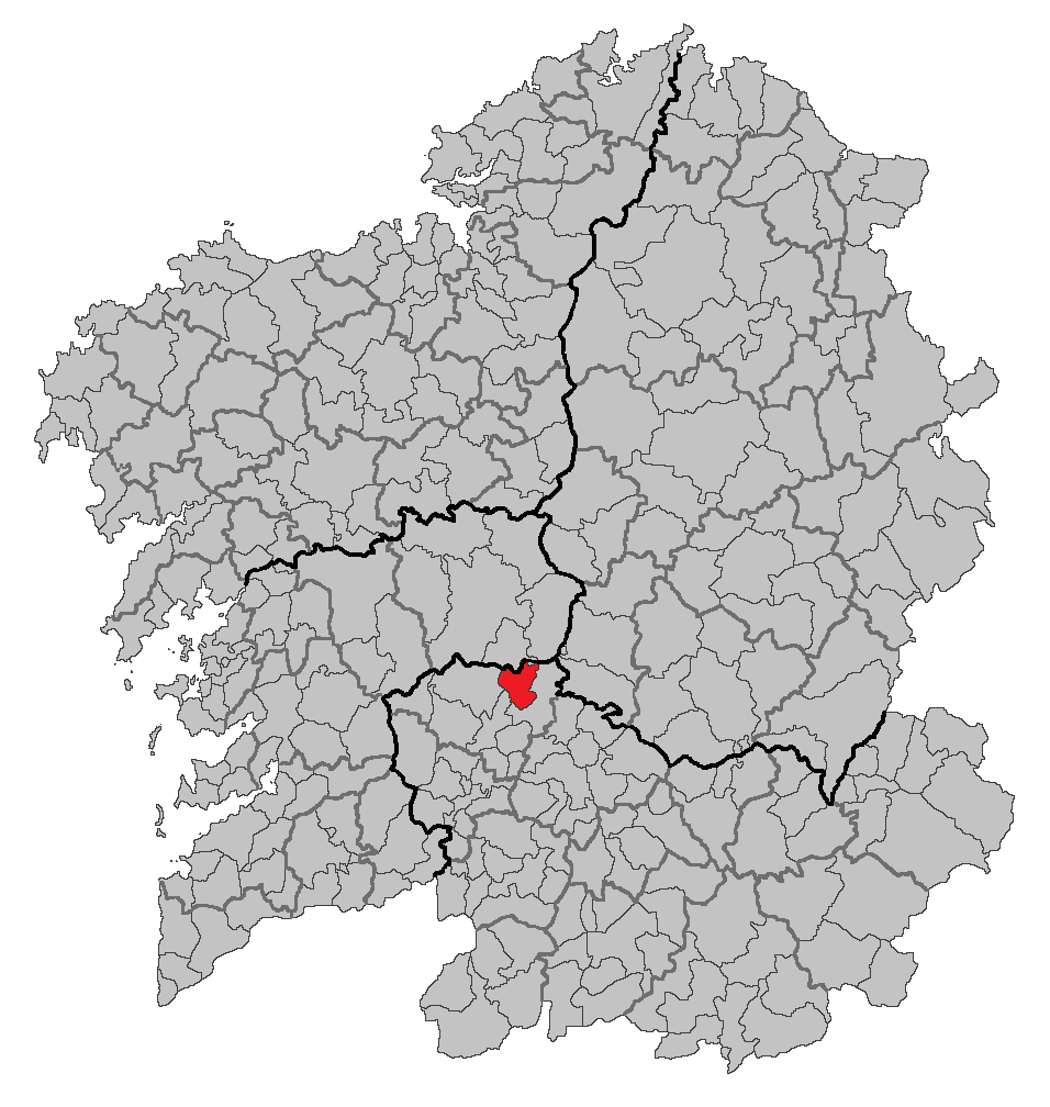 Mapa coa localización do concello de Piñor.